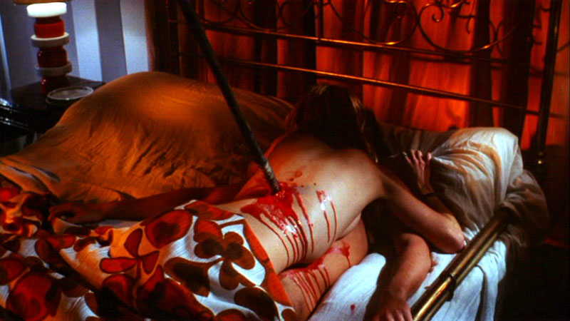 Screenshot dal film Reazione a catena (1971) di Mario Bava. Fonte Fonte: Cult Cinema